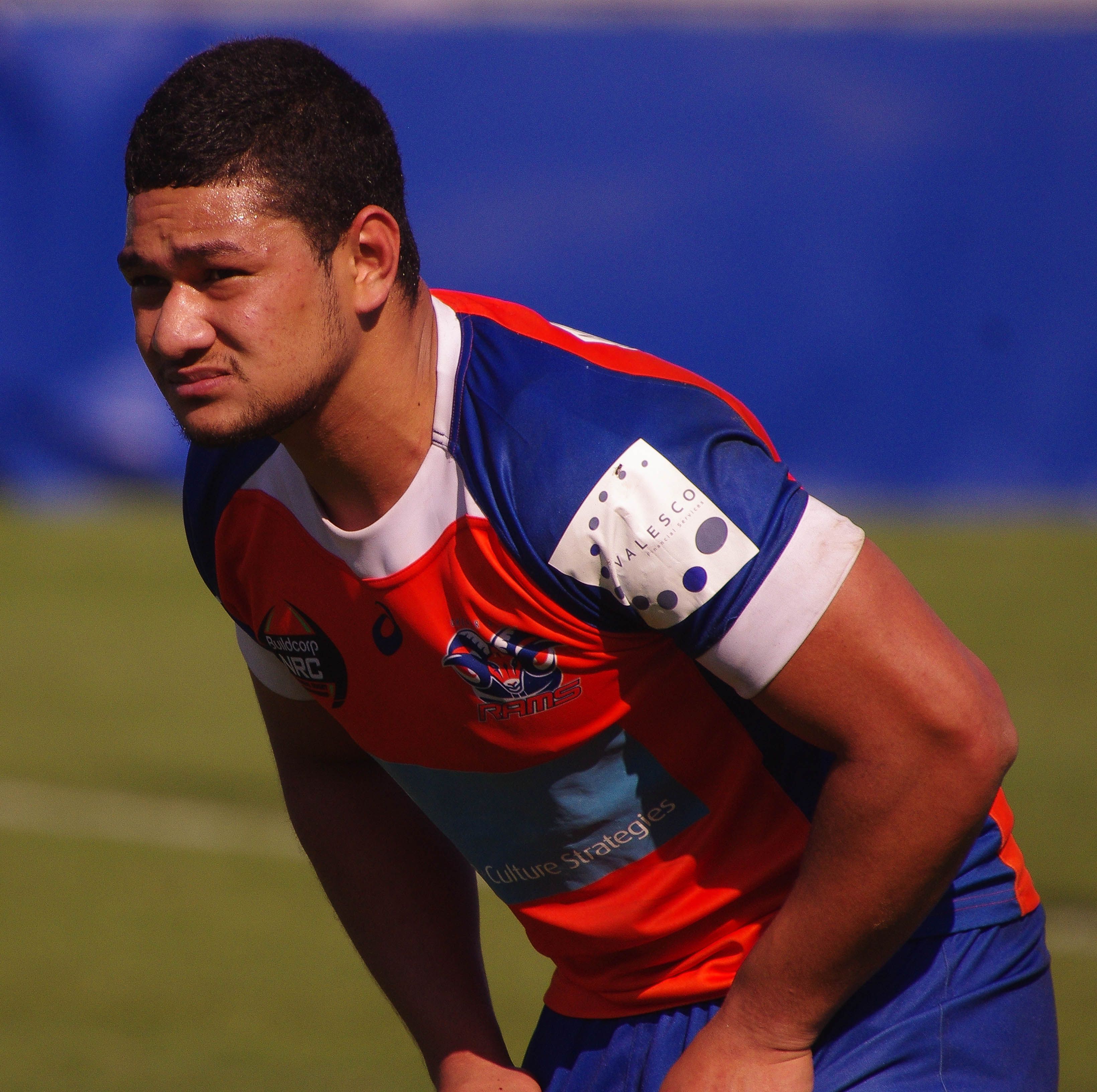 HENRY TAEFU